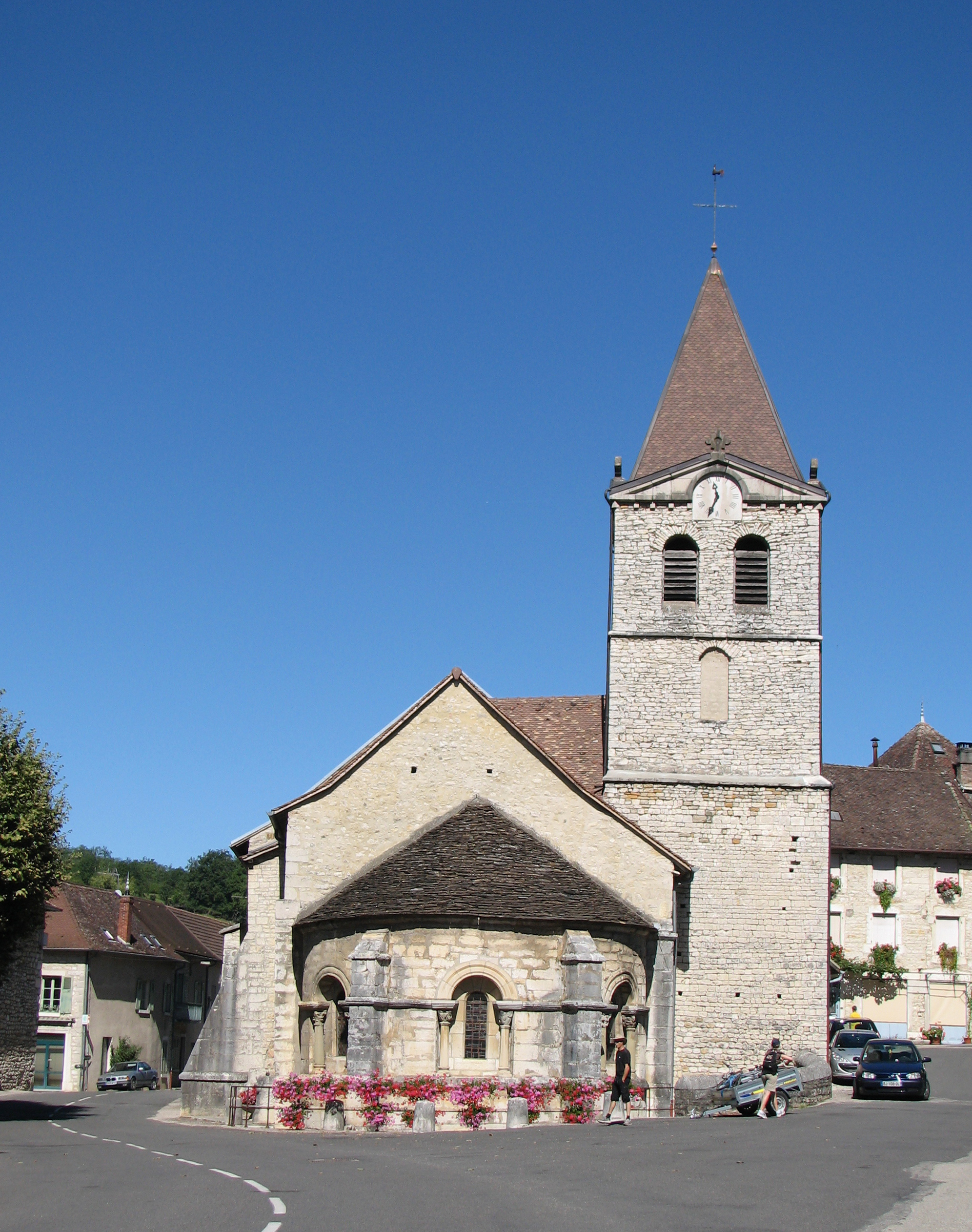 Église de Lhuis (Ain, France)